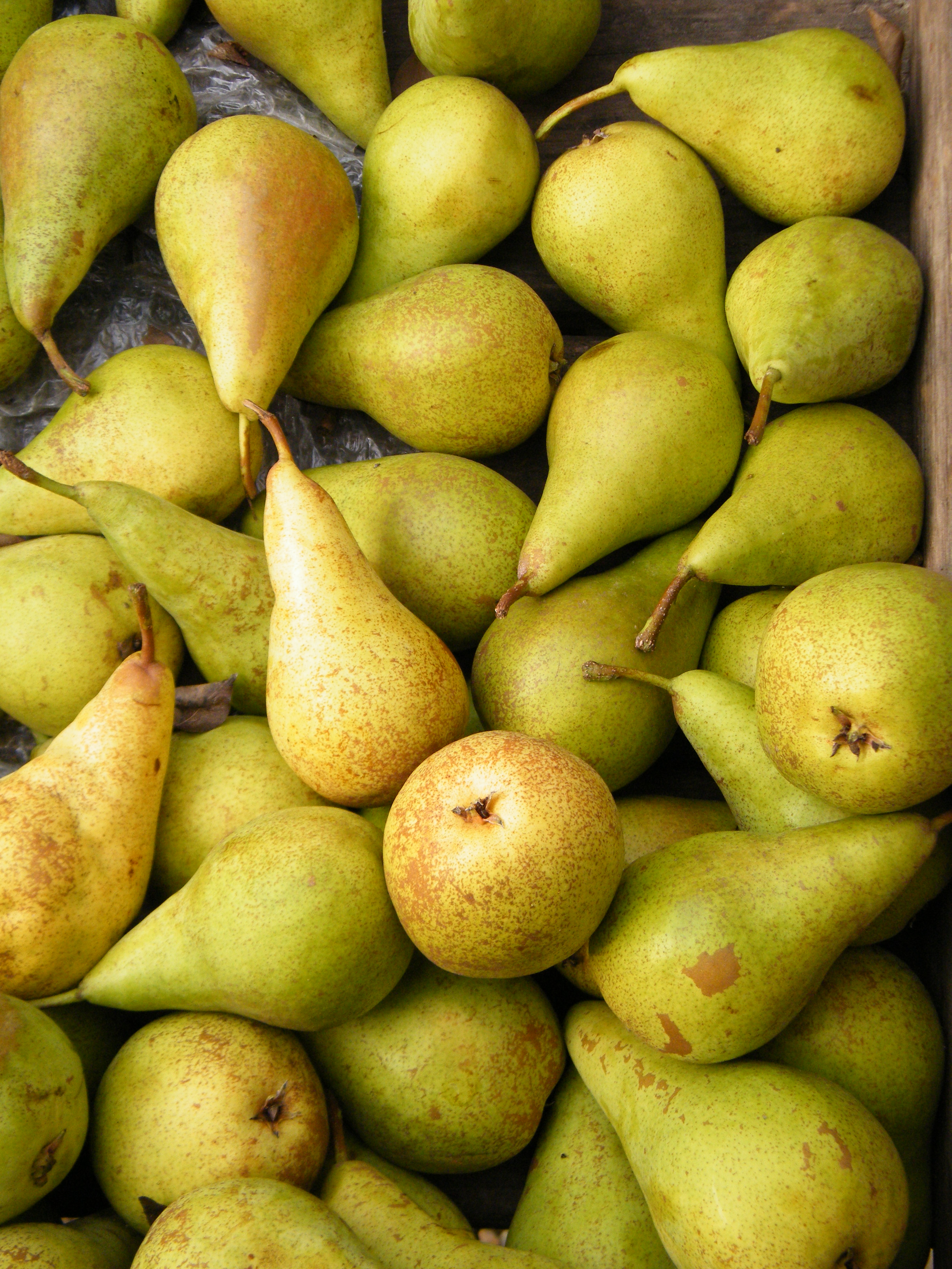 Poires Concorde, Franc-Picard, Vron, Somme,Fr